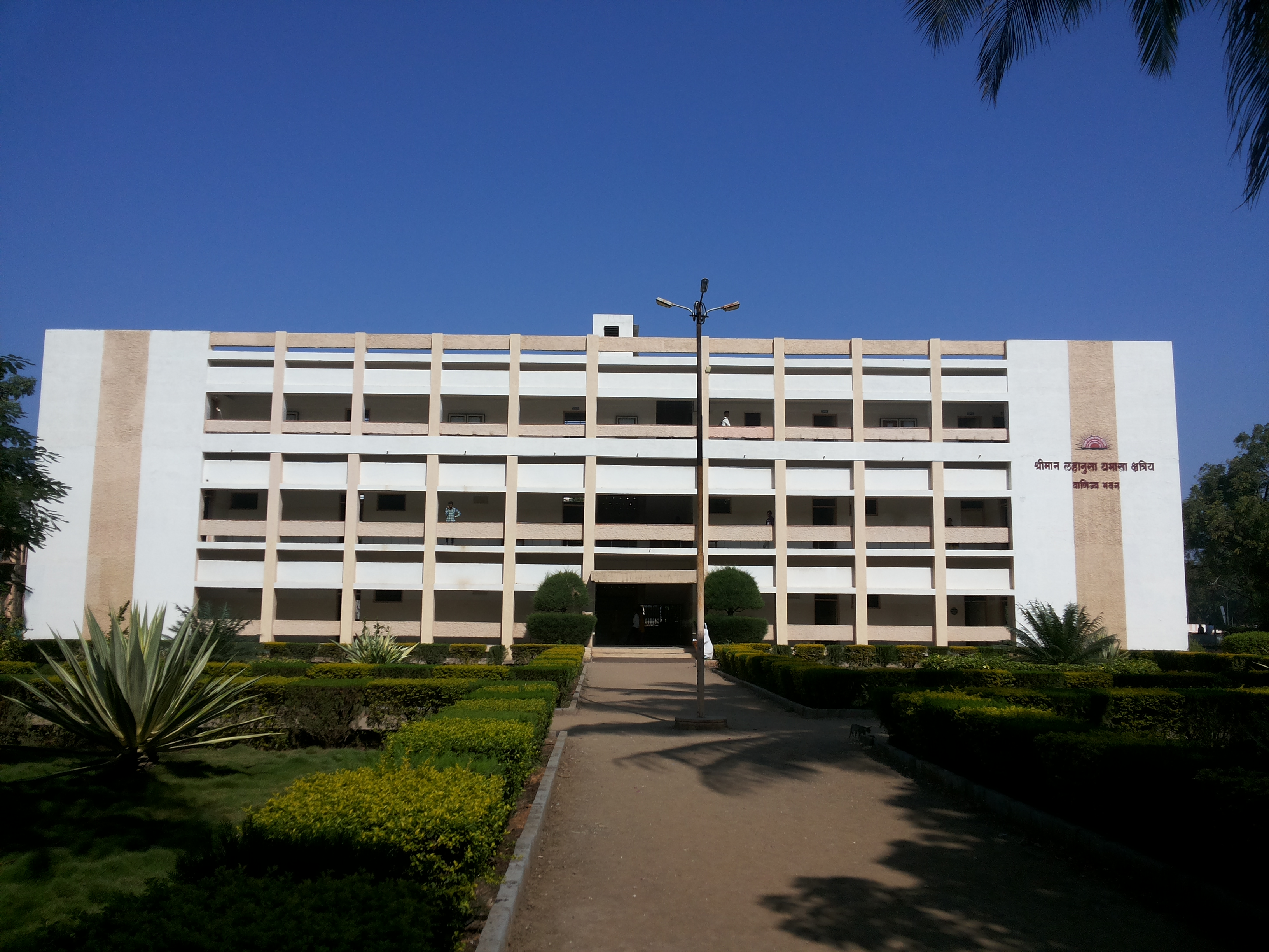 श्रीमान लहानुसा यमासा क्षत्रिय वाणिज्य भवन, संगमनेर महाविद्यालय, संगमनेर